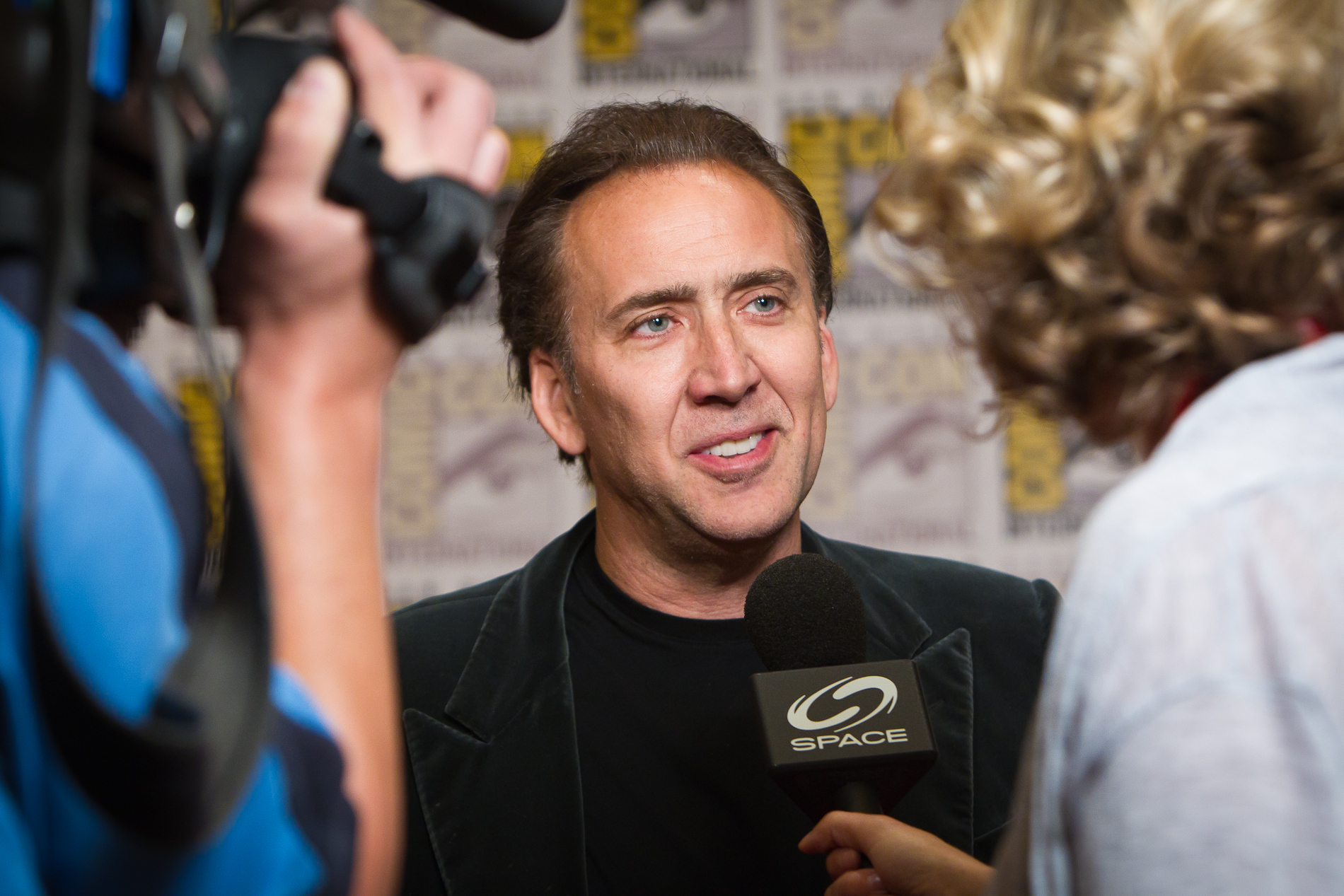 Nicholas Cage, sou um fan dele!